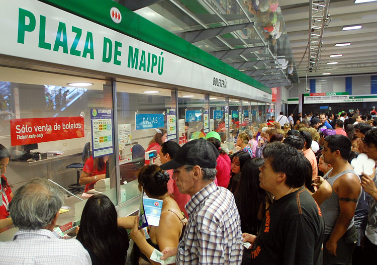 Boletería de la estación Plaza de Maipú en su inauguración.